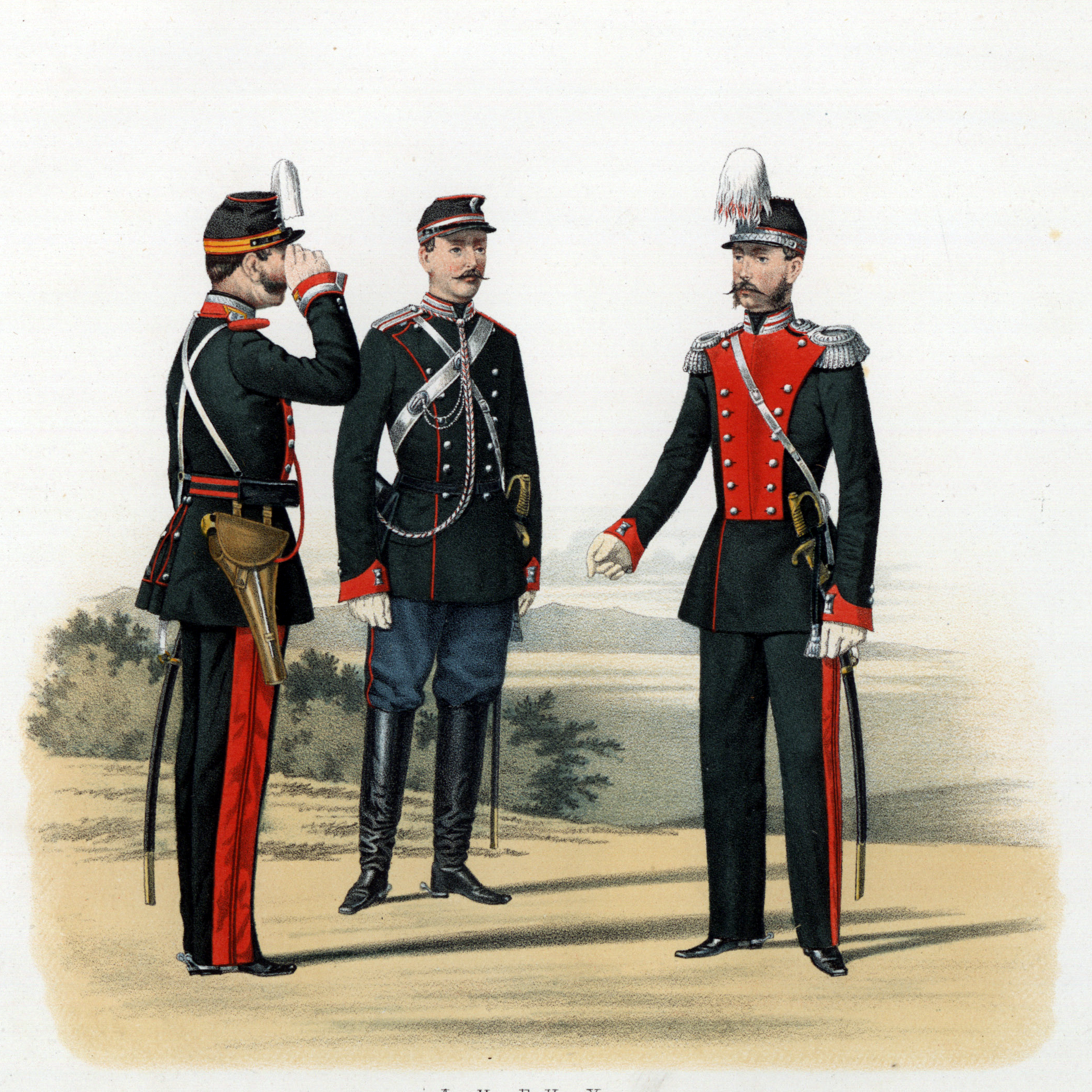 Лейб-Гвардии Драгунский полк 1862-1870. Вахмистр. (Парадная форма) Обер-Офицер. (Походная форма) Генерал. (Праздничная форма)